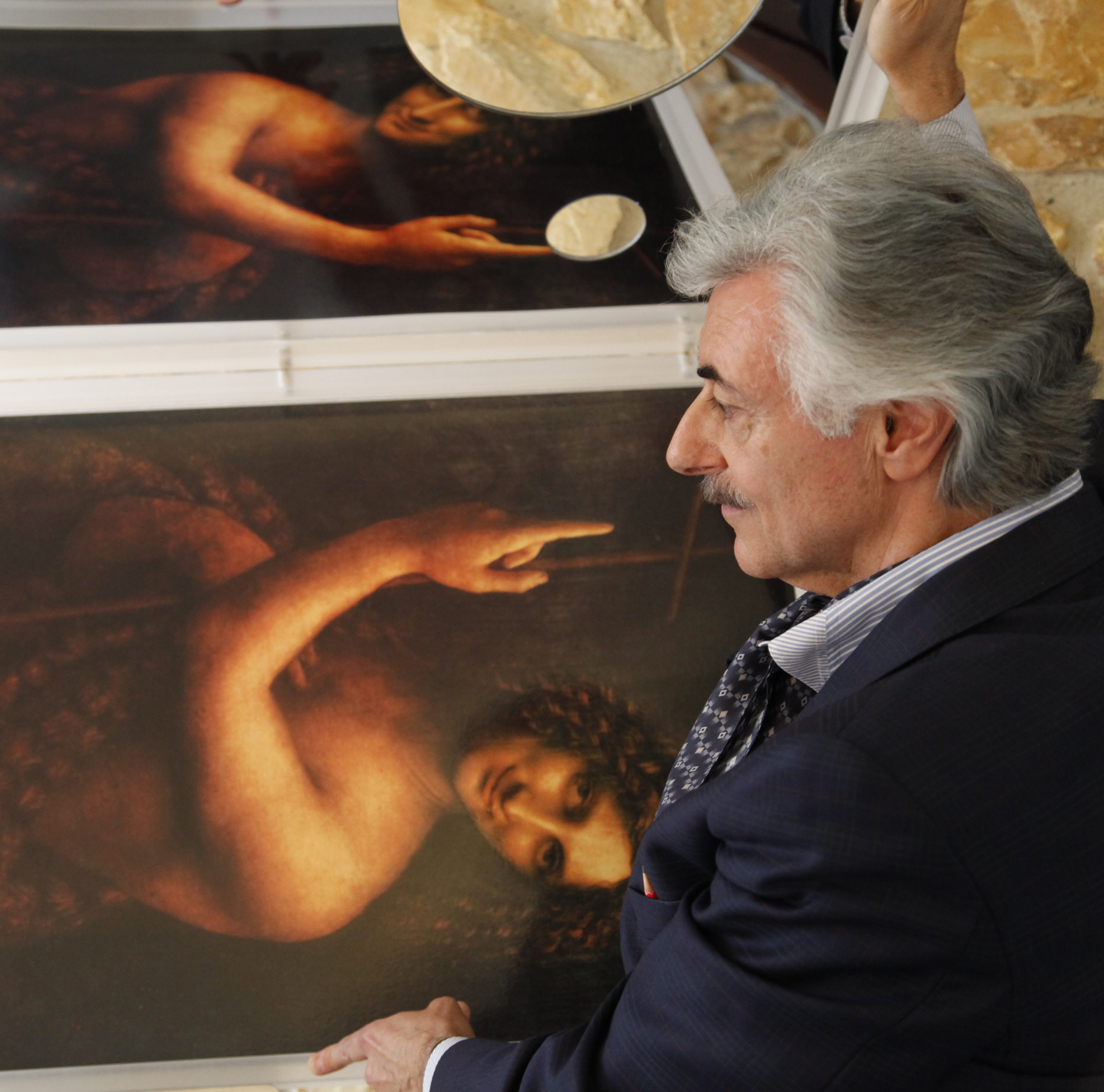 L'architetto Oreste Ruggiero nel 2012